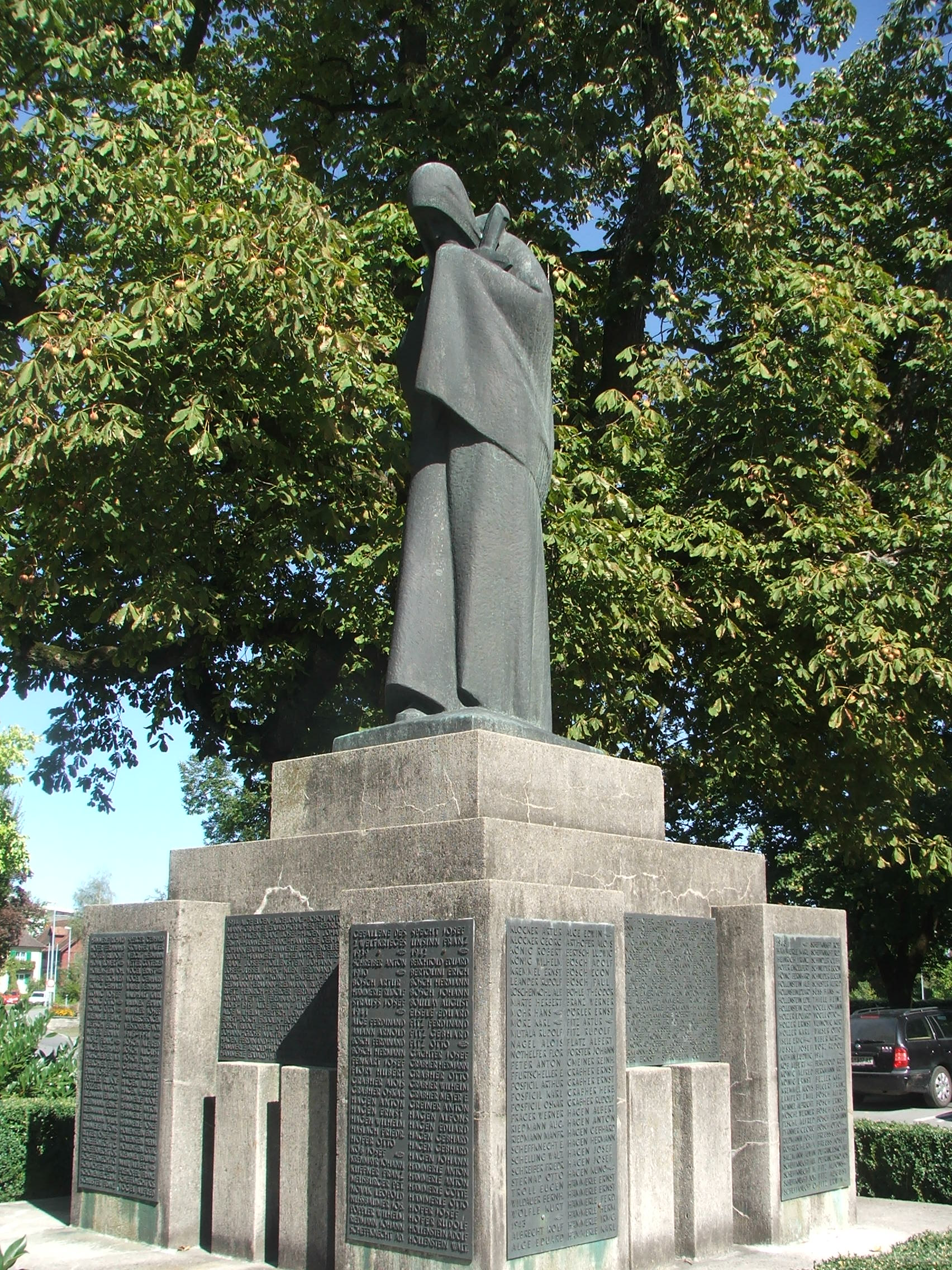 Kriegerdenkmal